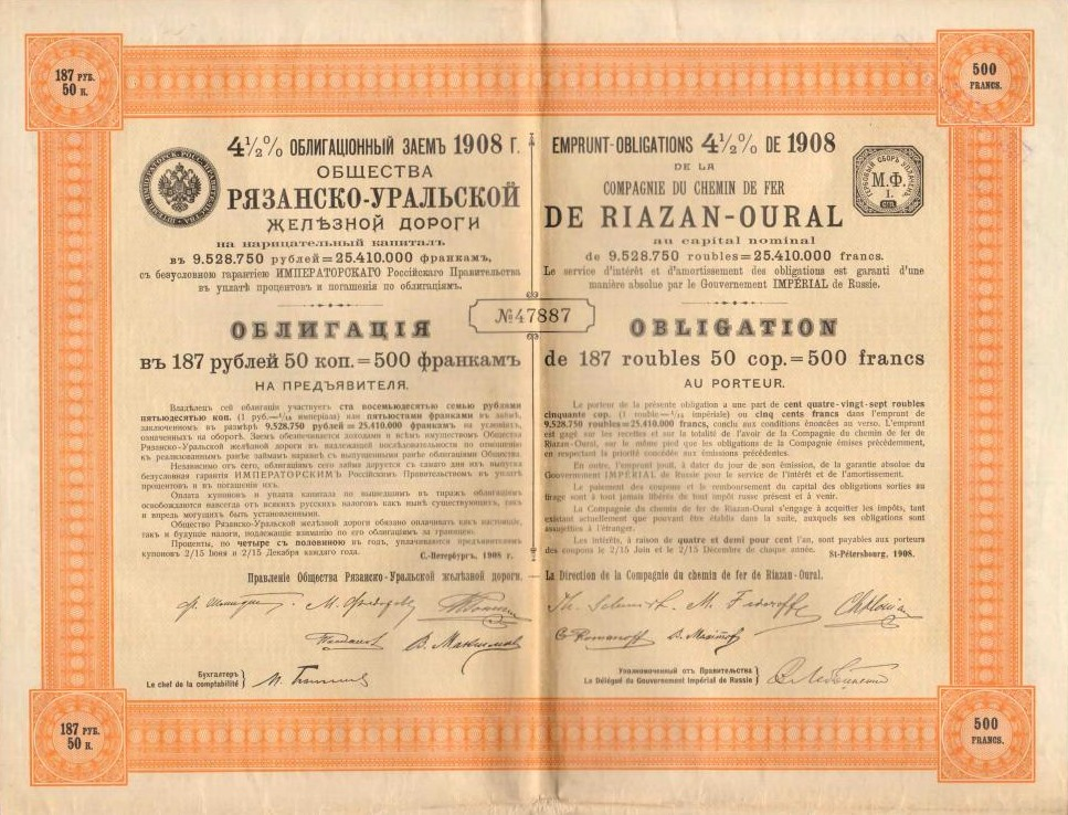 Облигация на предъявителя Общества РУЖД(Рязанско-Уральская железная дорога) на 500Fr(187р50коп). 1908г.